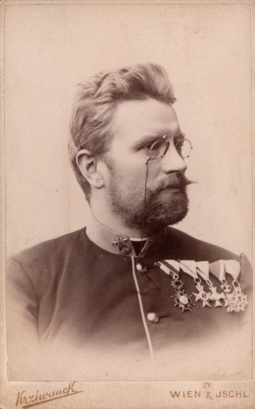 Karel Komzák II (1850-1905)